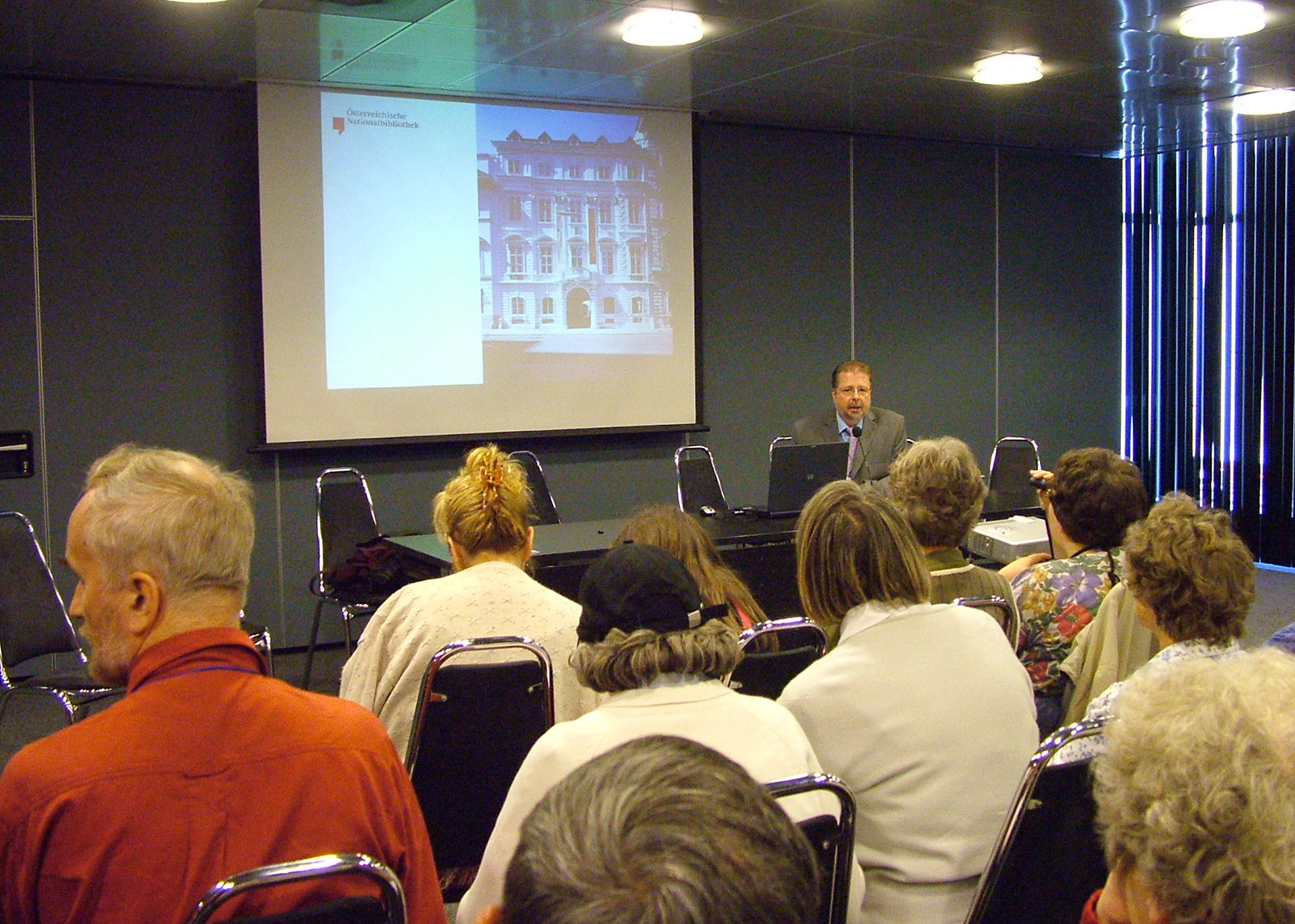 Universala Kongreso de Esperanto, Roterdamo 2008. Herbert Mayer prezentas la Esperantomuzeon.